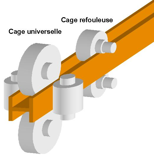 Cage universelle et cage refouleuse pour le laminage des produits longs (poutrelles). Licensing Auteur : Taveneaux 25 janvier 2006 à 15:02 (CET) Catégorie:Schémas